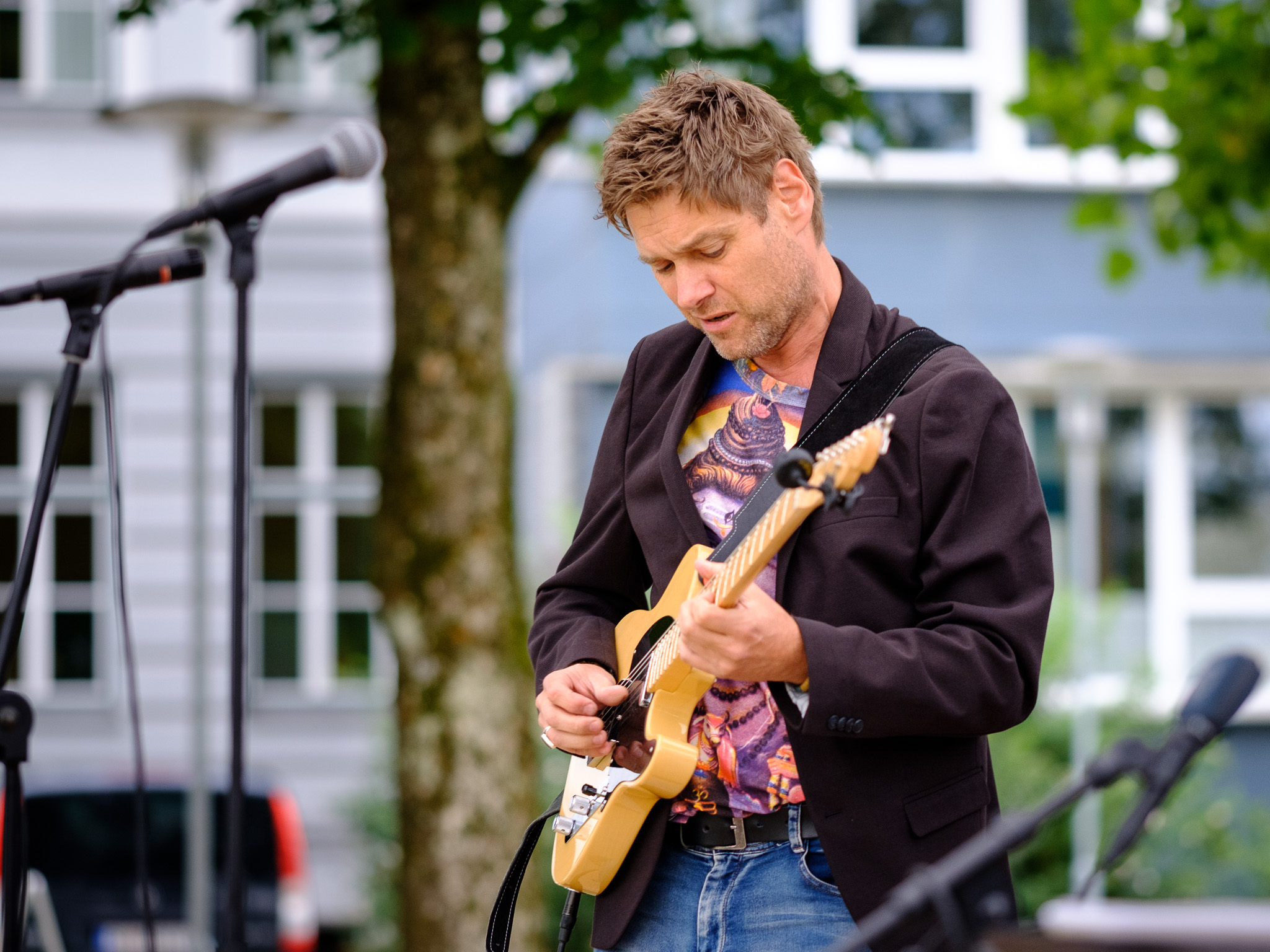 Frank Schwinn, österreichischer Gitarrist, bei seinem Auftritt am 2017-09-09 in Vöcklabruck